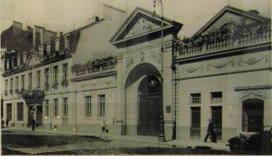 2. Beethovenhalle in Bonn - Eingangsbereich und Fassade Fotoausschnitt der öffentlichen Informationstafel in Bonn - Berliner Freiheit 20-24